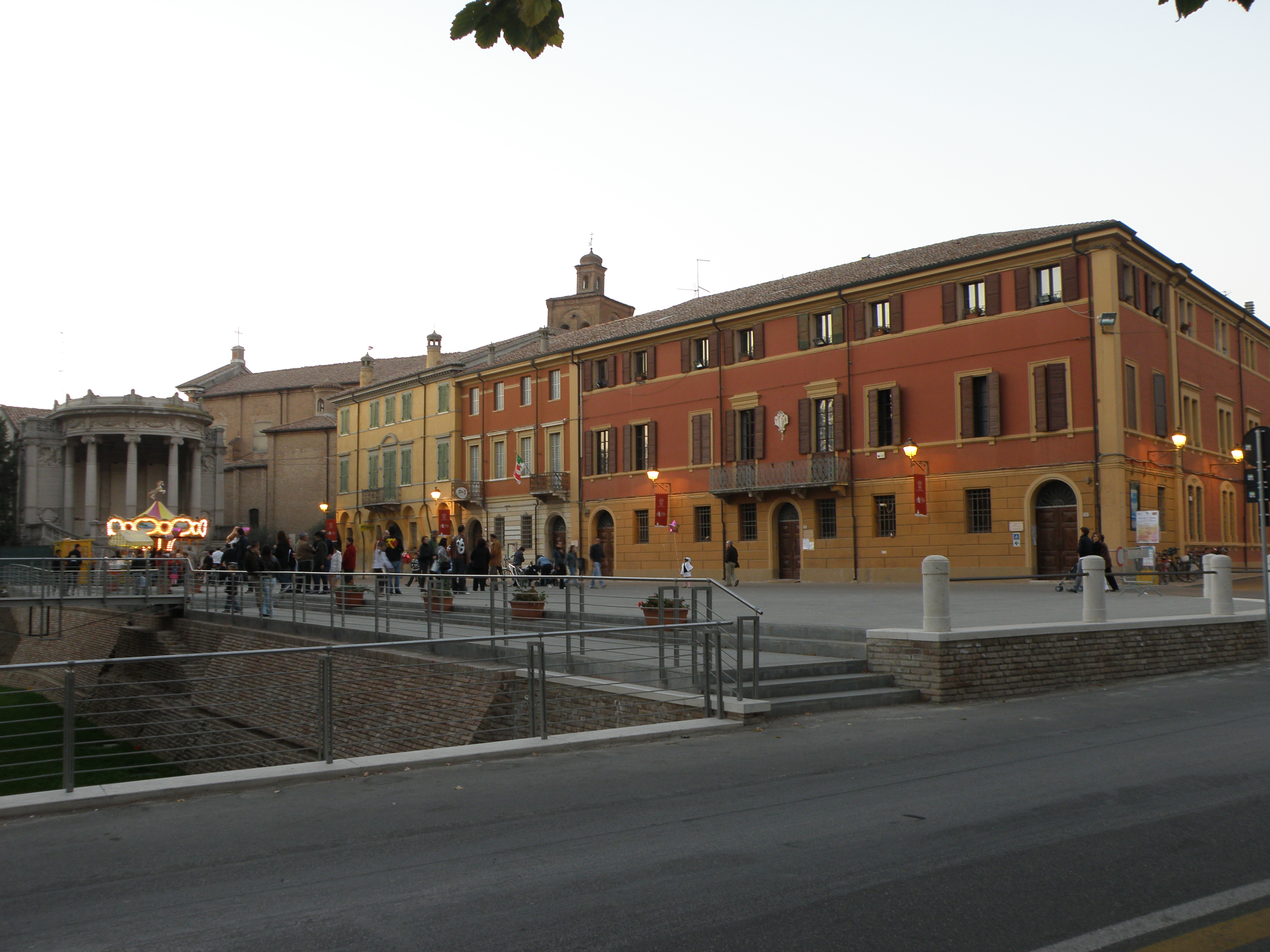 San Felice Sul Panaro: Palazzo Comunale